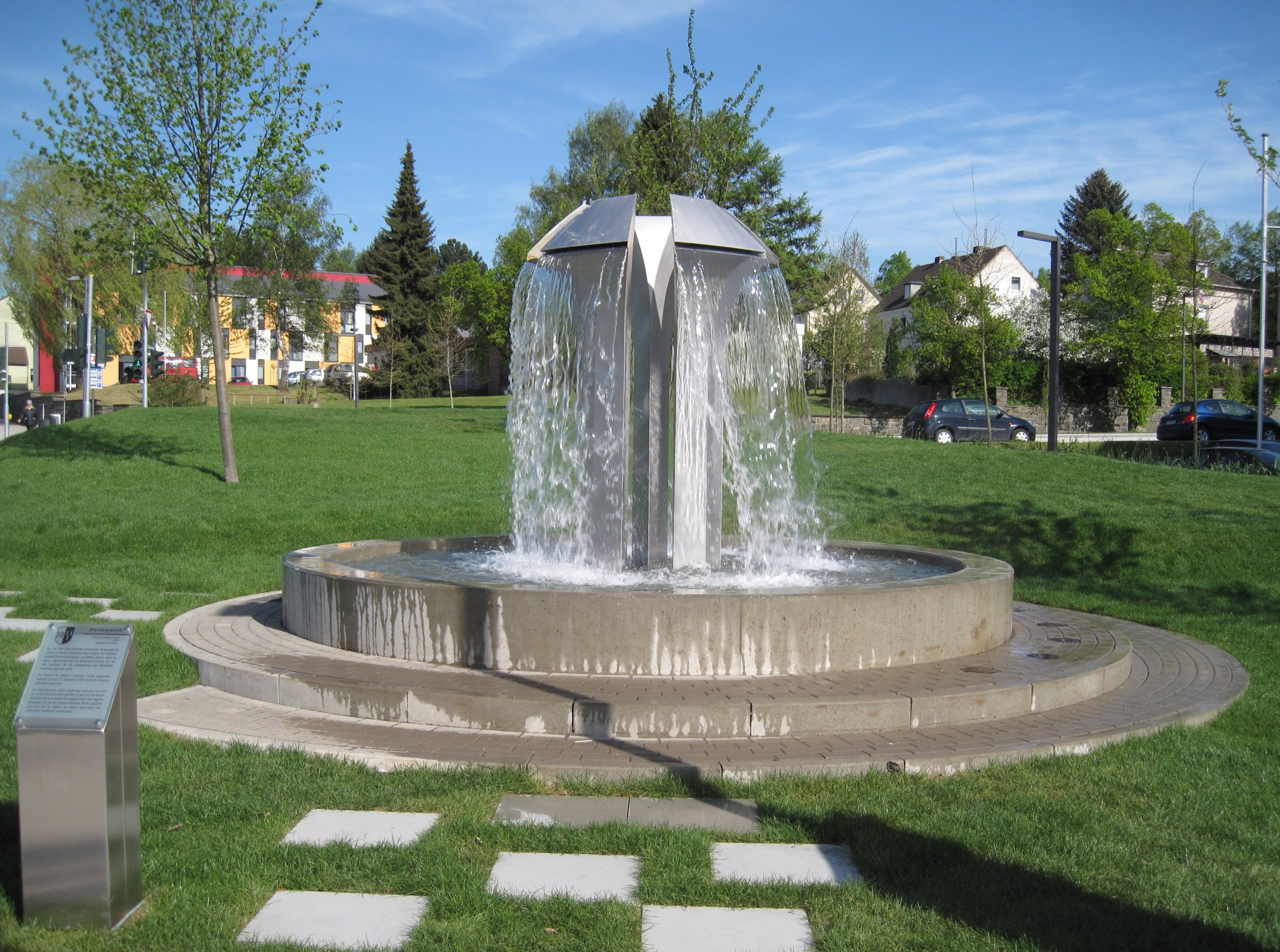 Brunnen in Hemer, nach einem Entwurf des 1985 17-jährigen Schülers Carsten Schauhoff (Hemer) des Friedrich-Leopold-Woeste-Gymnasiums in Hemer. Der Brunnen entstand aufgrund der Teilnahme an einem Ideenwettbewerb, der vom Ausschuss für Stadtplanung und Wirtschaftsförderung seinerzeit für Hemeraner Schulen ausgeschriebenen wurde. Eingeweiht wurde der Brunnen am 27. September 1985 auf dem Hademareplatz. Standort ist seit April 2010 die Ostenschlahstraße/Ecke Bahnhofstraße. Fünf Edelstahlsäulen (ringförmig zusammenstehend) im oberen Teil nach außen gewölbt, damit das Wasser sich auf breiter Fläche ergießen kann. Das Material des Esembles ist aus Edelstahl und Granit.